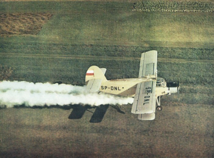 Samolot rolniczy An-2R podczas opylania.